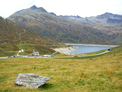 Zicht op de pashoogte van de Lukmanier